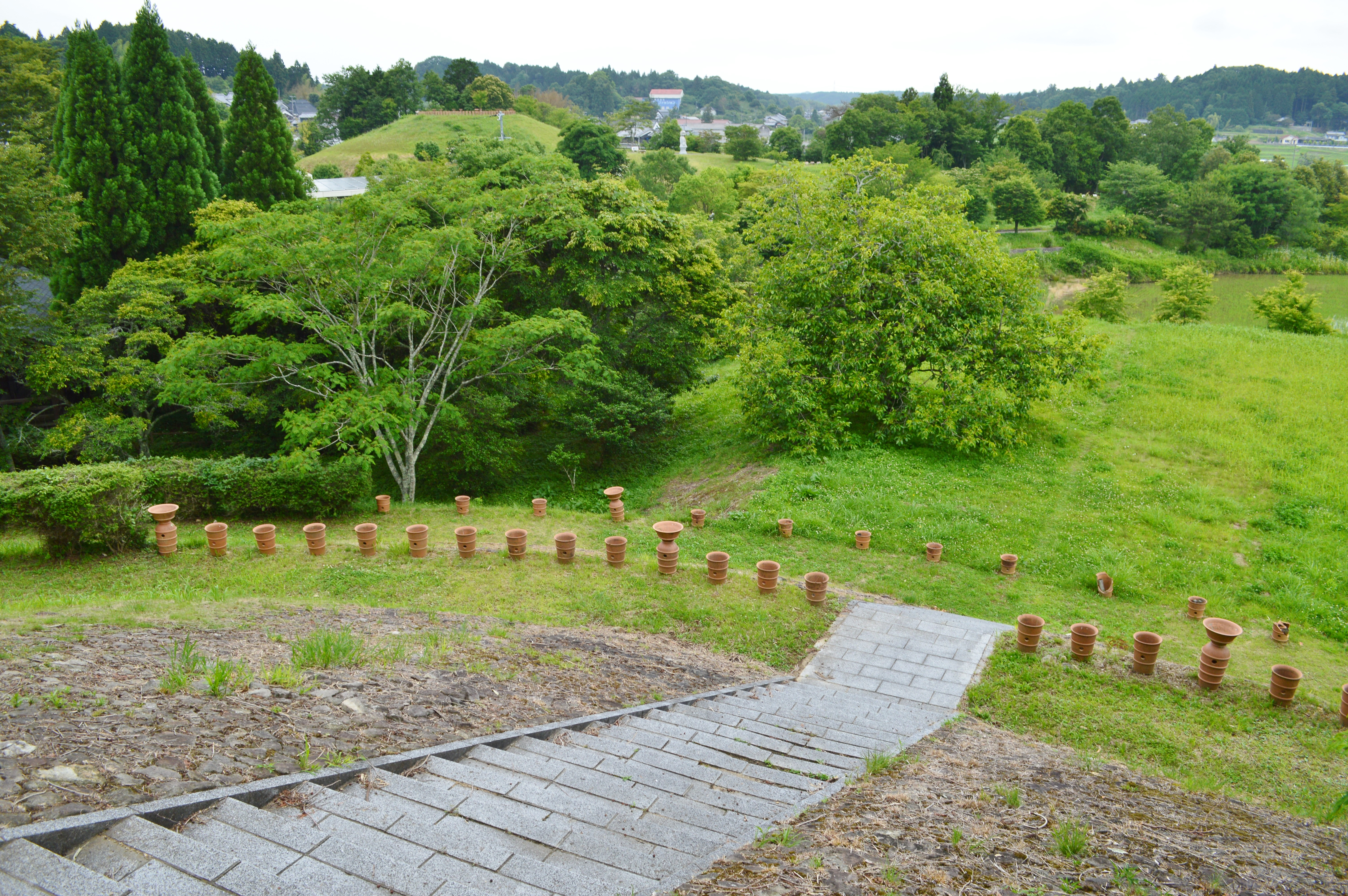 三陵墓東古墳から三陵墓西古墳を望む